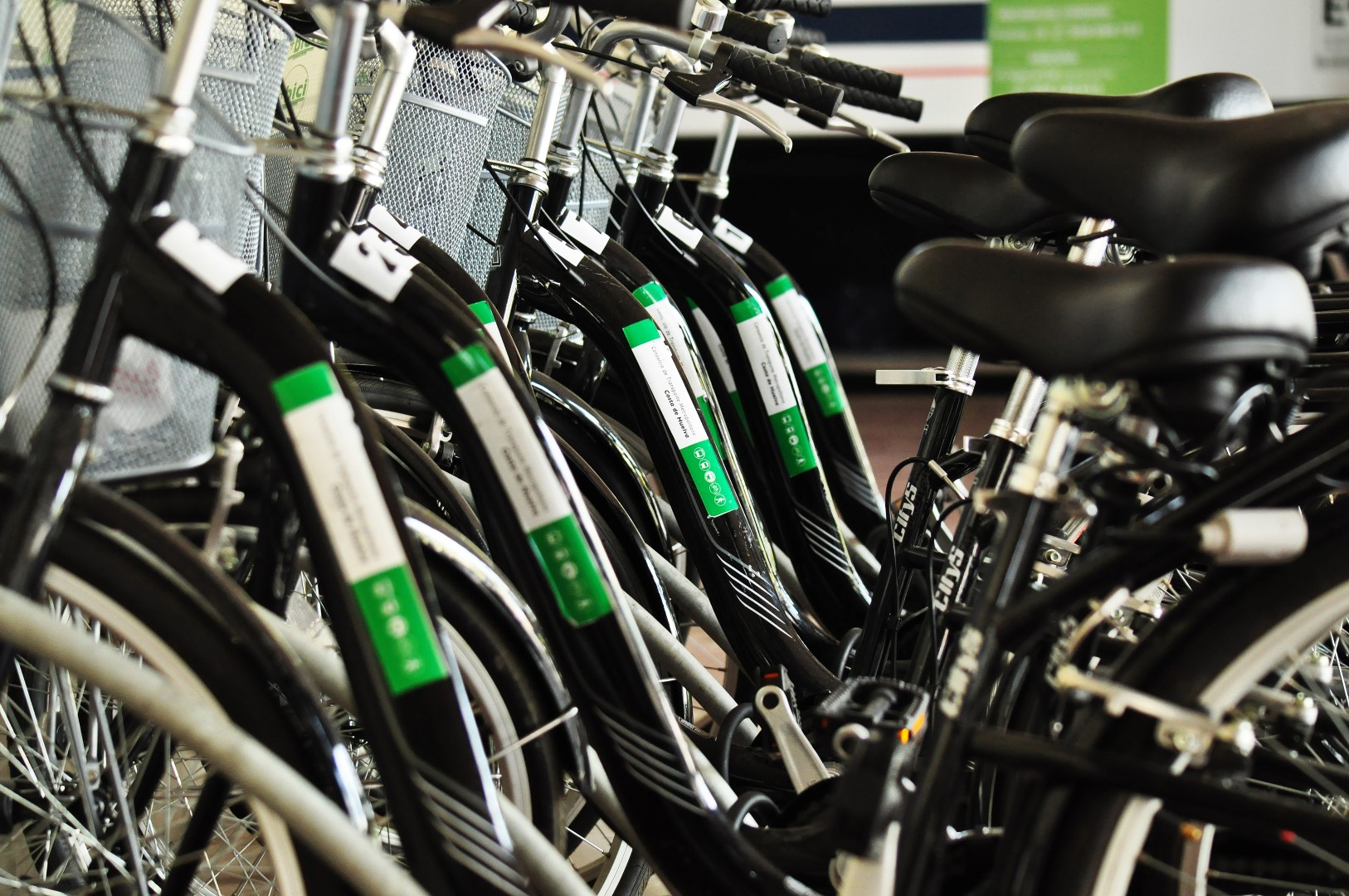 Bicicletas del servicio de préstamo gratuito +Bici